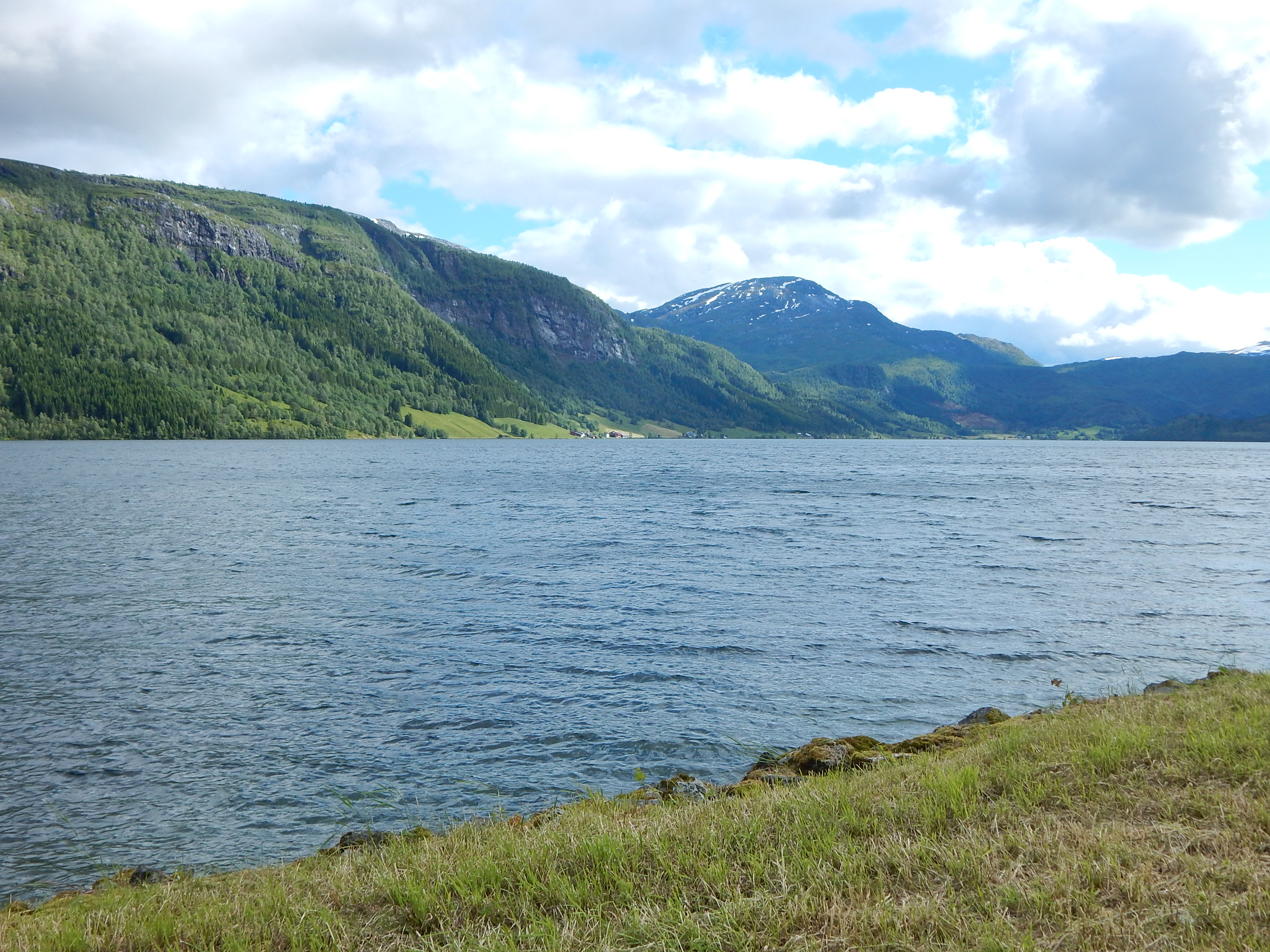 Haukedalsvatnet